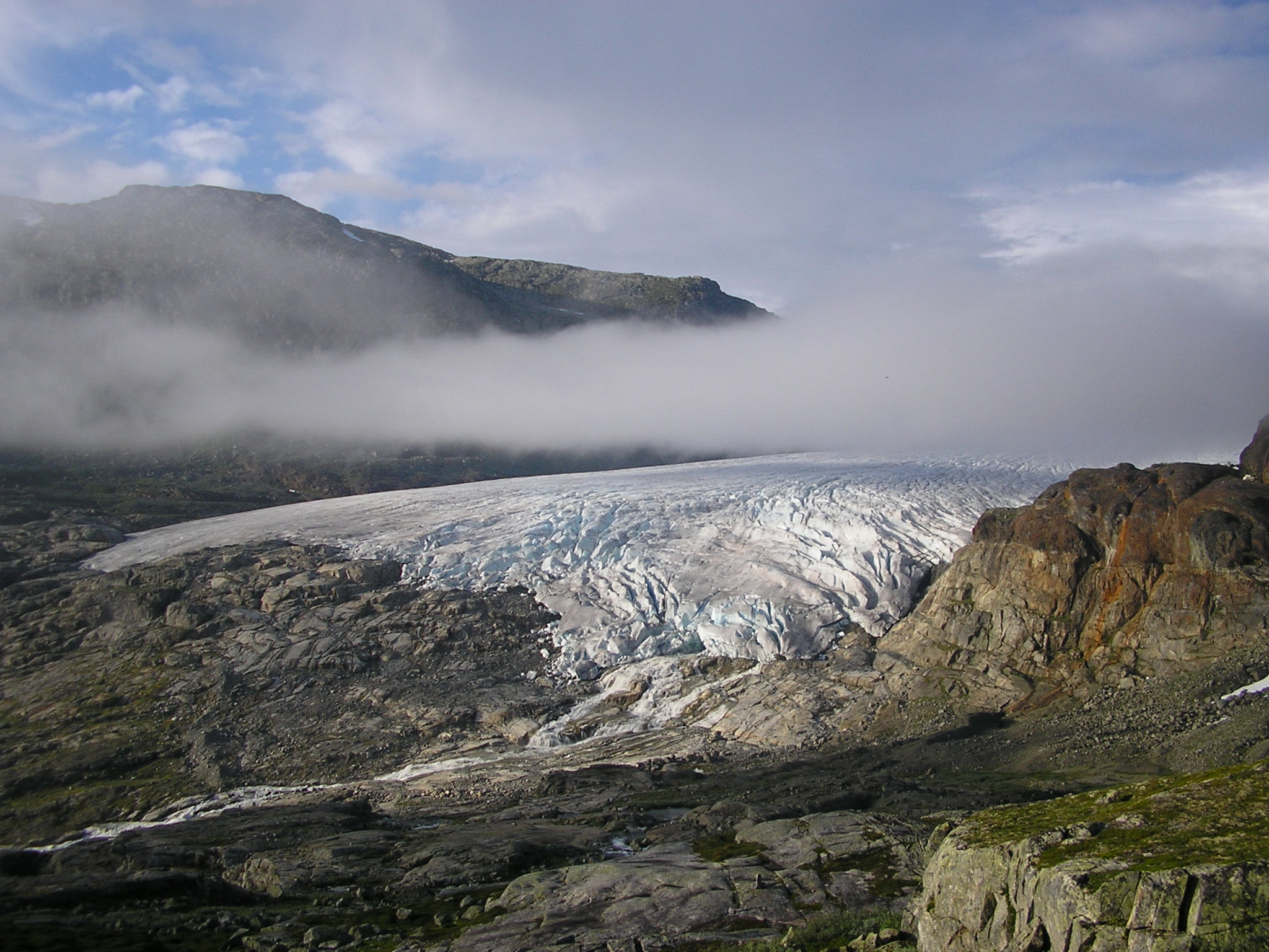 Hardangerjøkulen